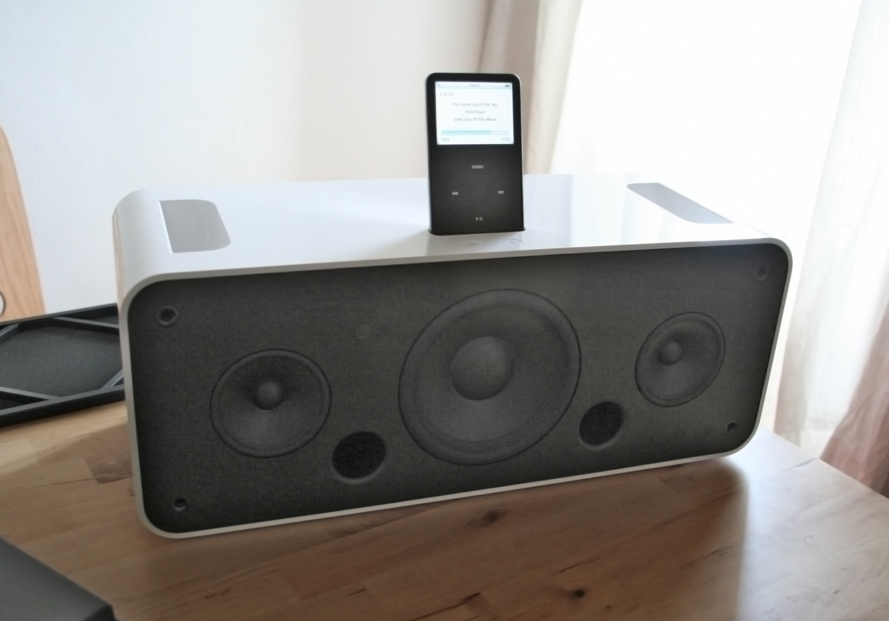 An iPod Hi-Fi...iPod Hi-Fi